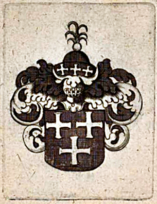 Schönenberg von den Kreuzen, Familienwappen